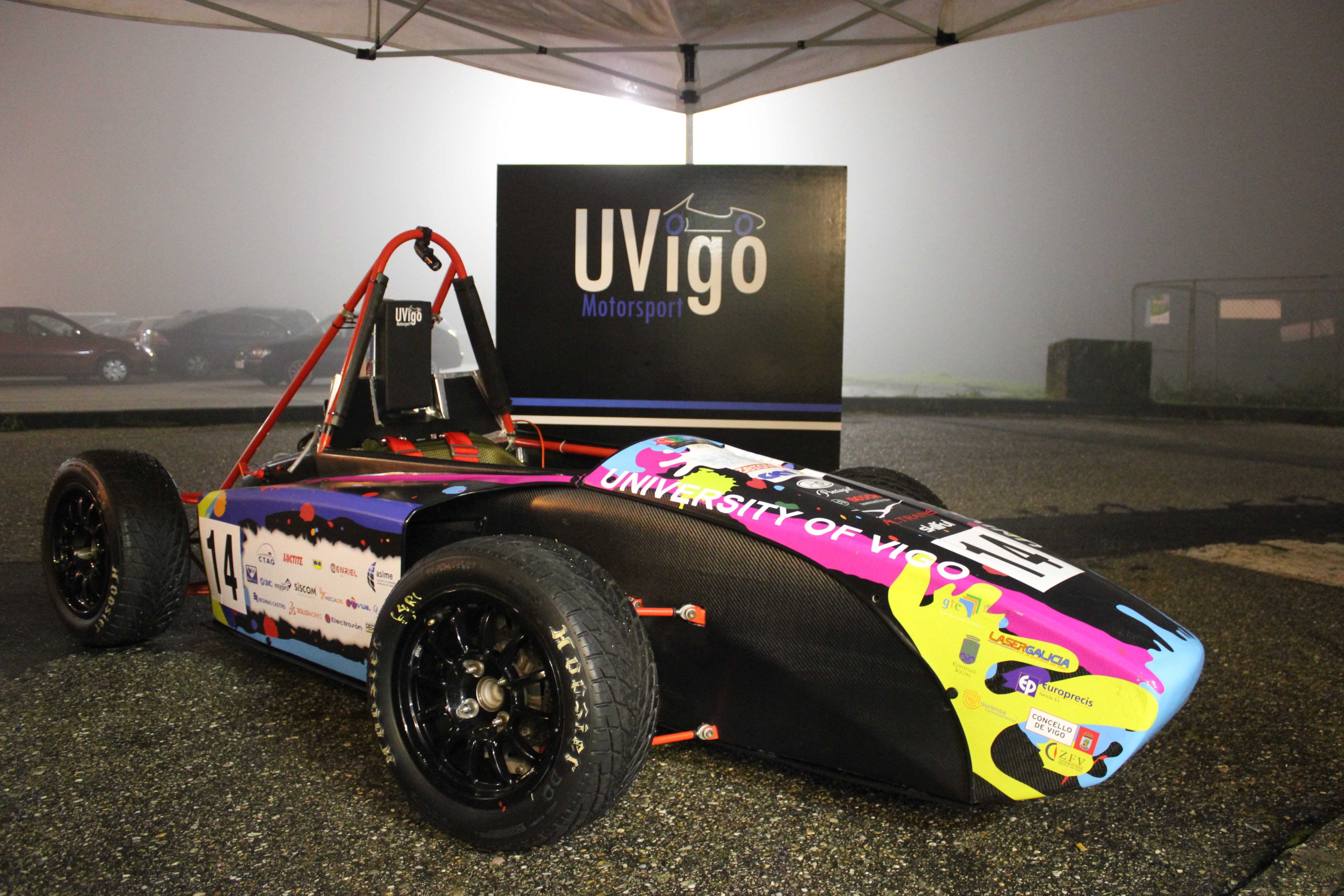 Monoplaza UM15